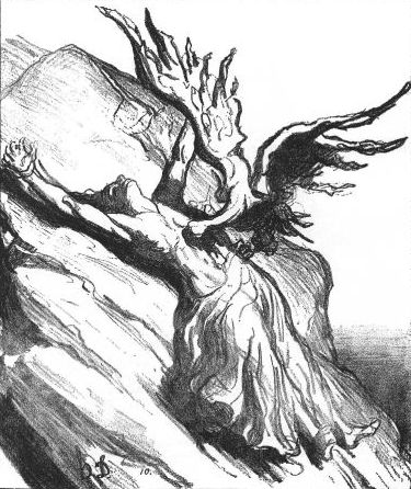 Desenho realizado por HonorÃ© Daumier (1808-1879)